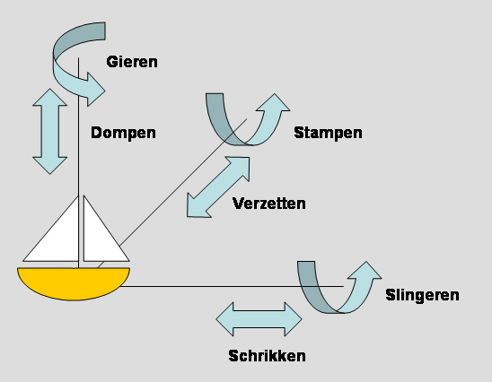 Sætning (Dompen), Sway (Verzetten), Surge (Schrikken), Duvning (Stampen), Rulning (Slingeren), Giring (Gieren).